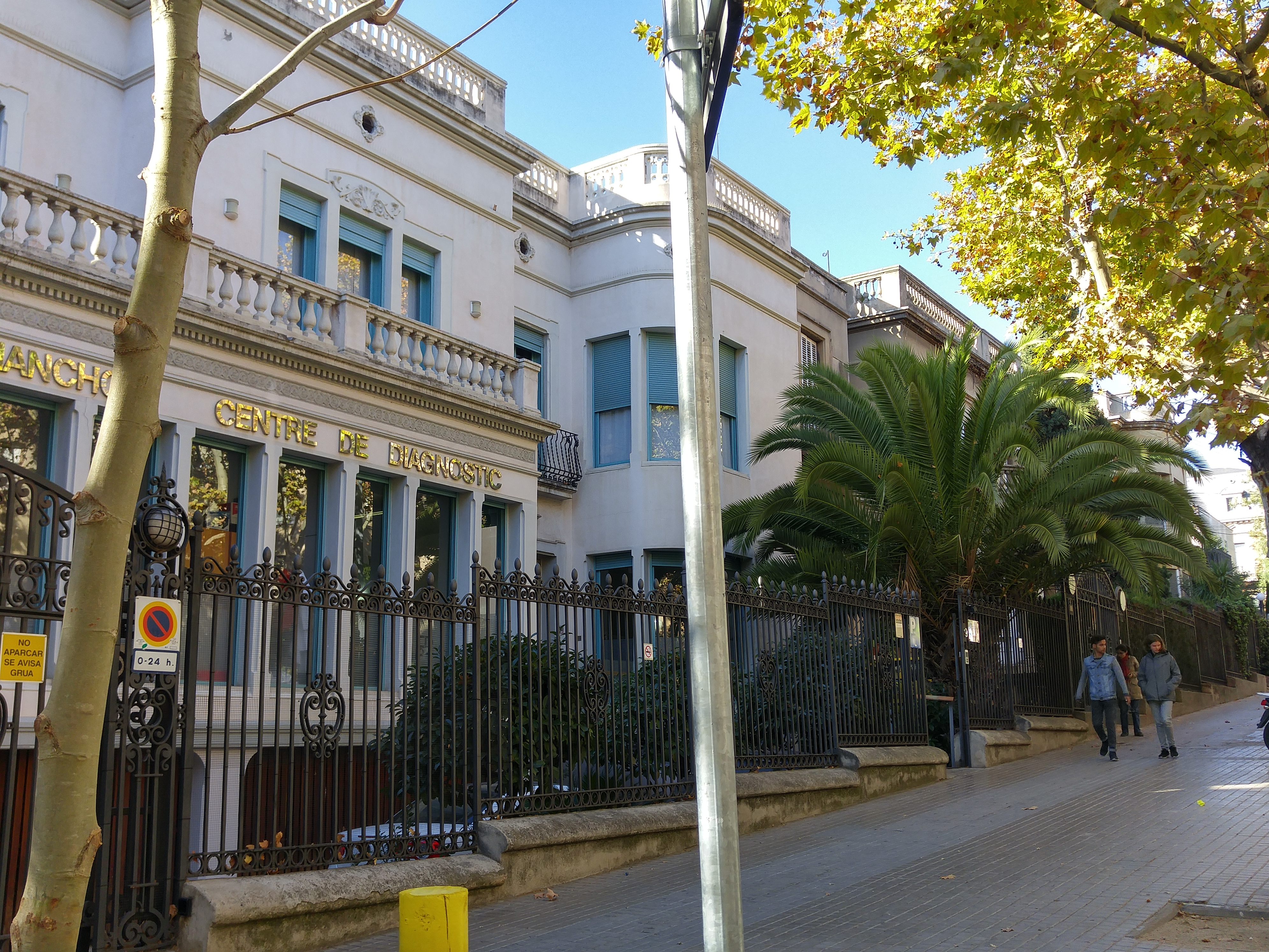 Cases Josefa Orpi Almirall (1910) a la avinguda del Tibidabo 9-13, Barcelona, de l'arquitecte Antoni Millàs Figuerola